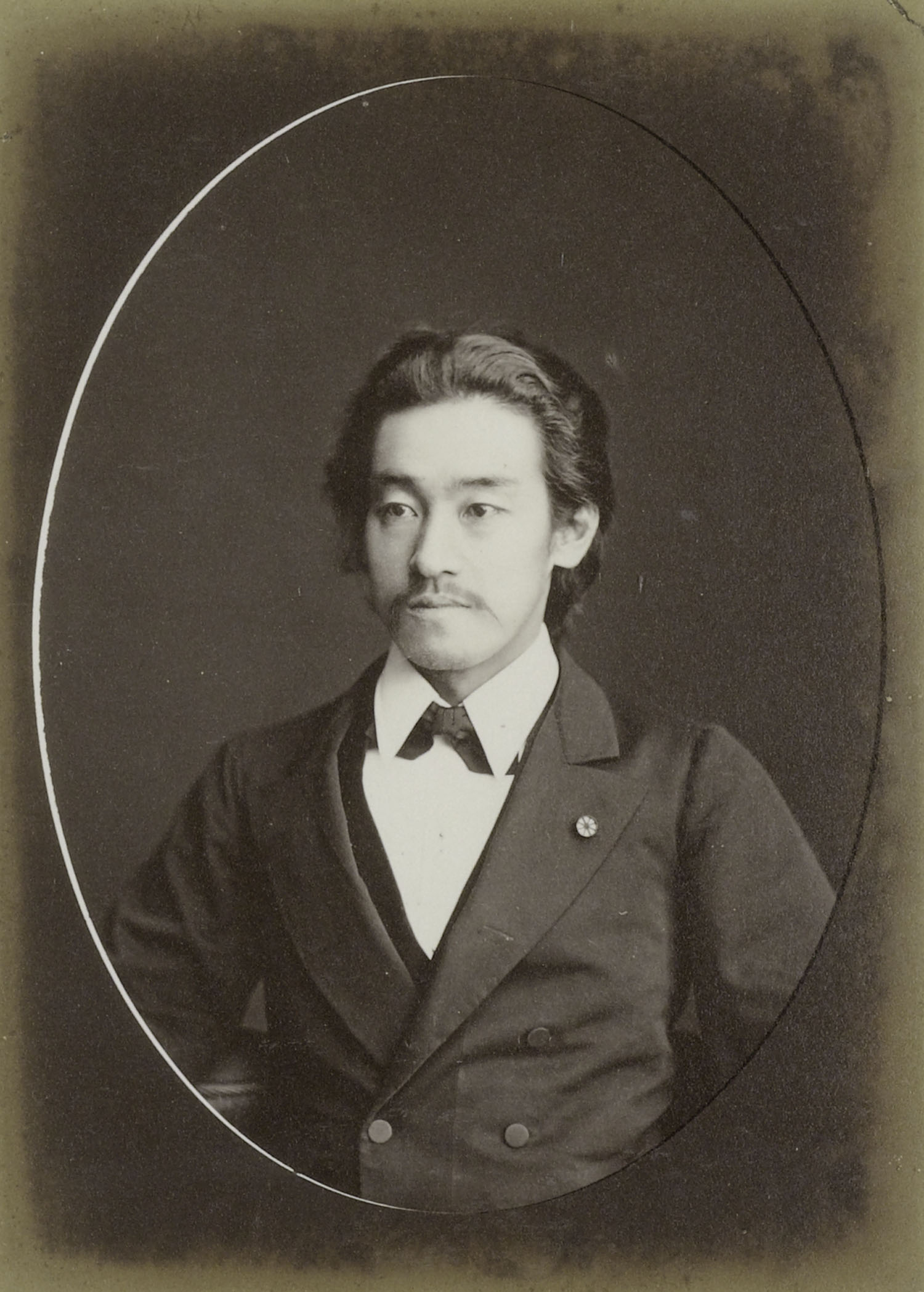 Kuki Ryūichi (九鬼 隆一・男爵, September 12, 1852 – August 18, 1931) was a samurai of provincial origin and politician who is best known as the father of the Japanese philosopher Kuki Shūzō